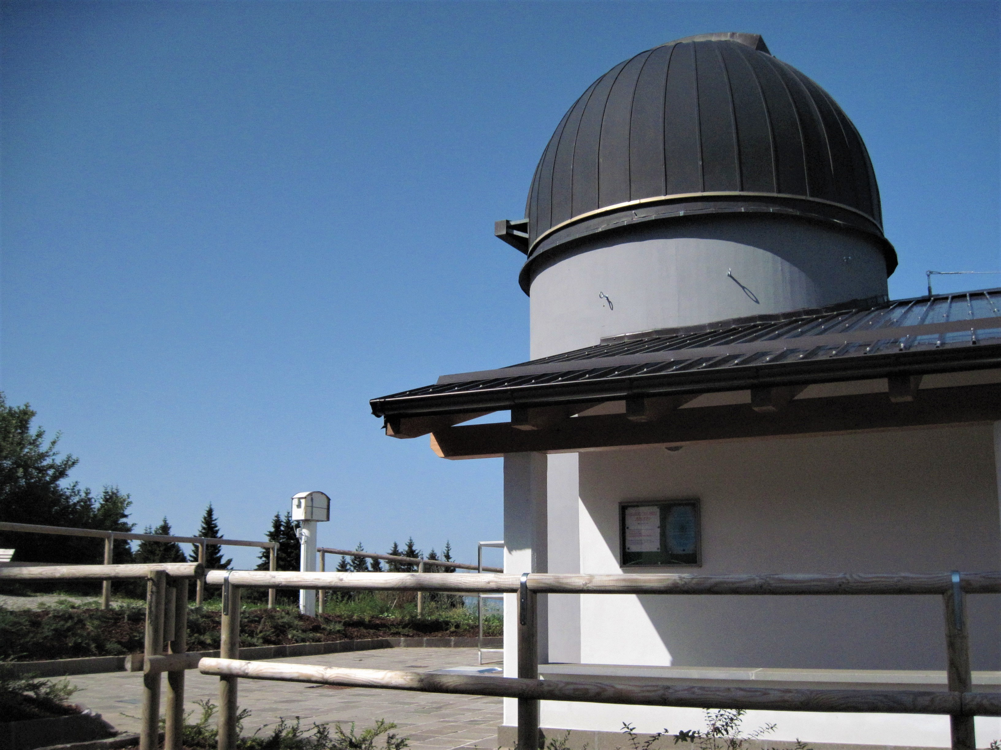 Esterno